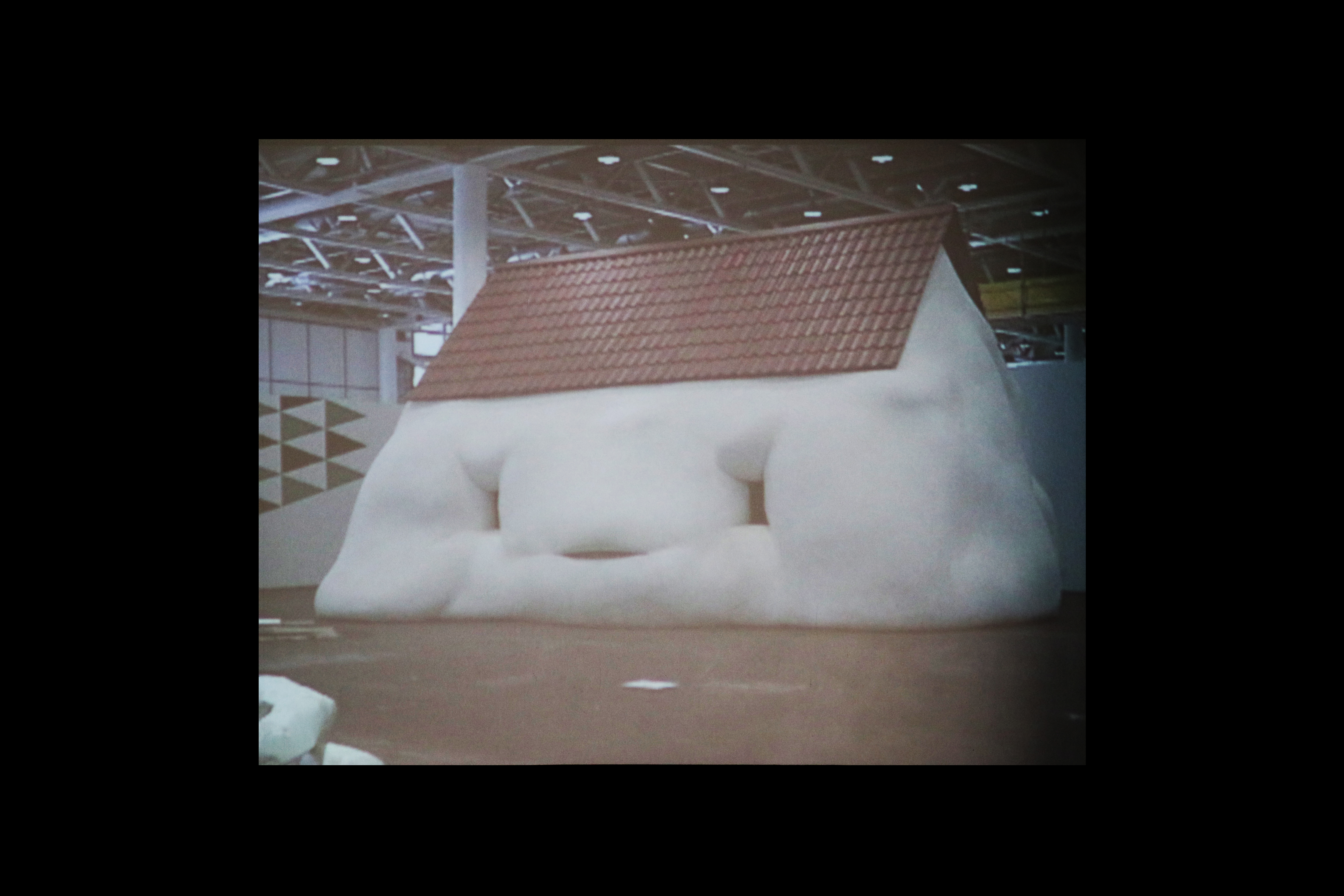 Erwin Wurm: Filmmontage im Fat House (2003) im Österreichischen Skulpturenpark in der Gemeinde Premstätten, Steiermark